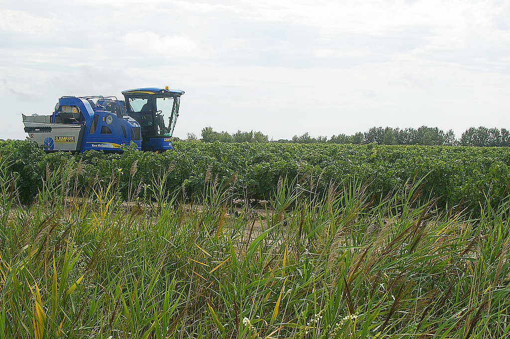 Machine à vendanger New-Holland intervenant le 19 août dans le vignoble d'Aigues-Mortes